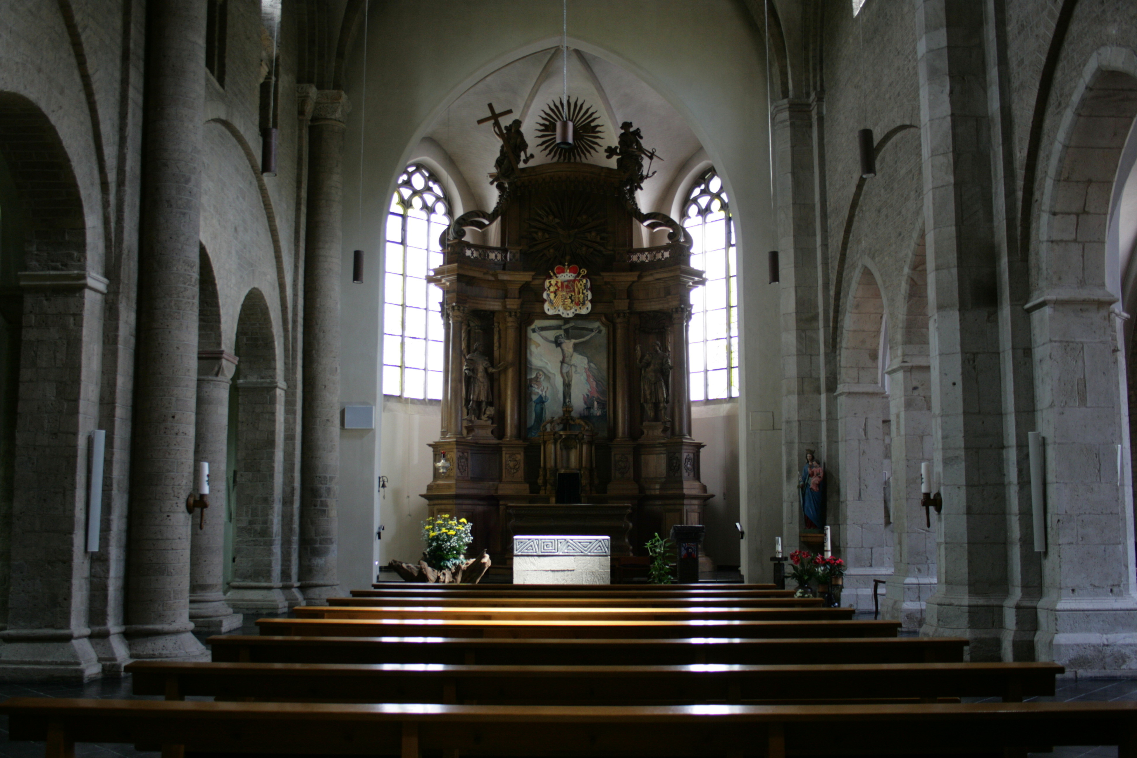 Stiftskirche St. Vitus in Hochelten, Emmerich am Rhein